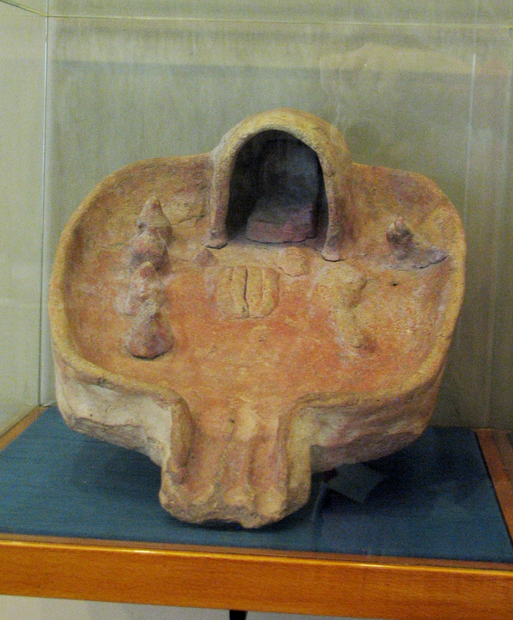 Dagon Museum, Downtown, Haifa, Israel The Museum is dedicated to the history of grain products מוזיאון דגון בעיר התחתית בחיפה שוכן במבנה המשרדים של ממגורות דגון. המוזיאון מוקדש לתולדות הדגן ומוצריו, וכלל ממצאים ארכאולוגים הקשורים בנושא וכן דגמים של מתקנים שונים בהם משתמשים בממגורות דגון אבן שחיקה ממקדש בסרביט אל ח'אדם בסיני, 1200 לפני הספירה